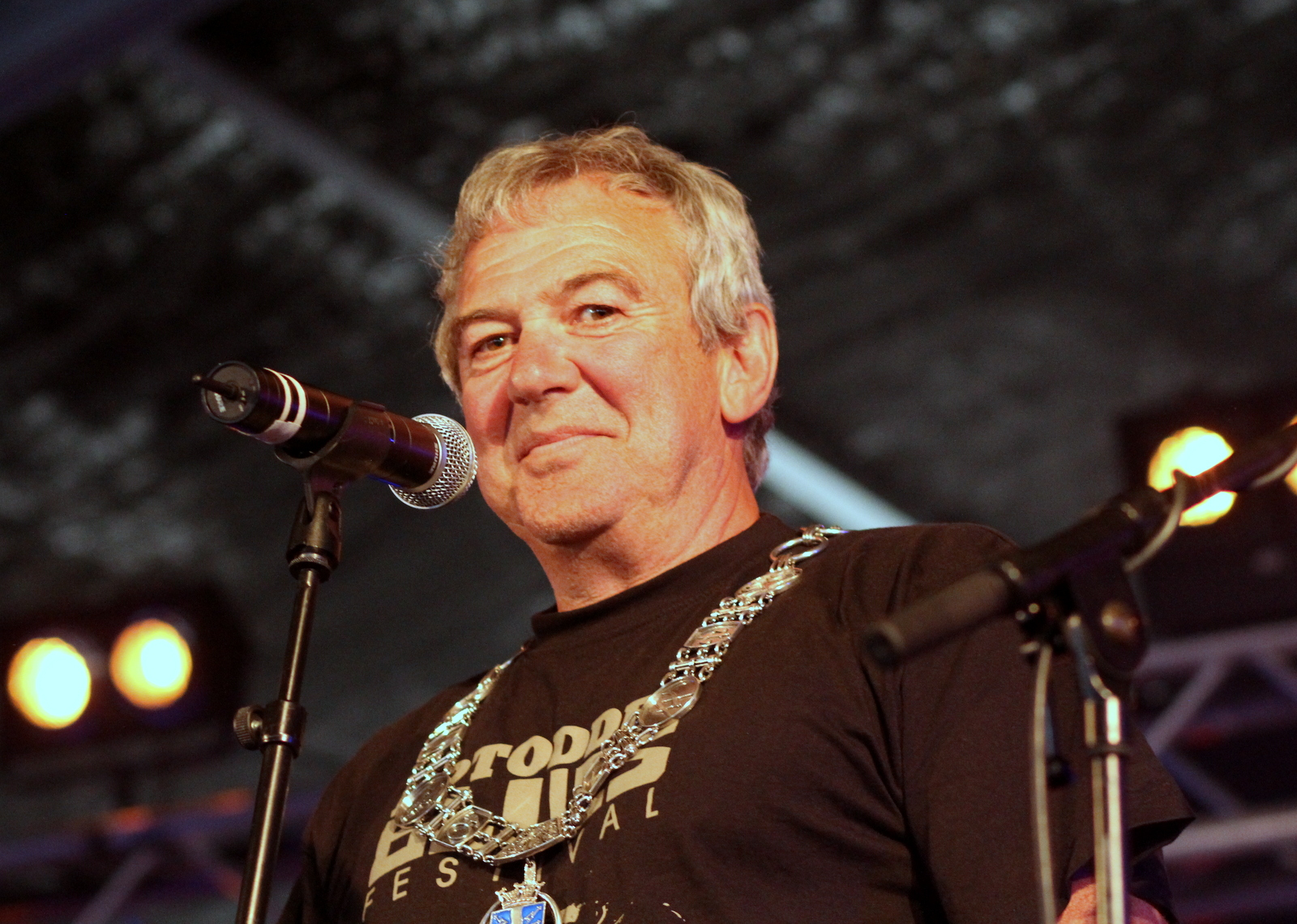 Jørn Christensen på Notodden Blues Festival